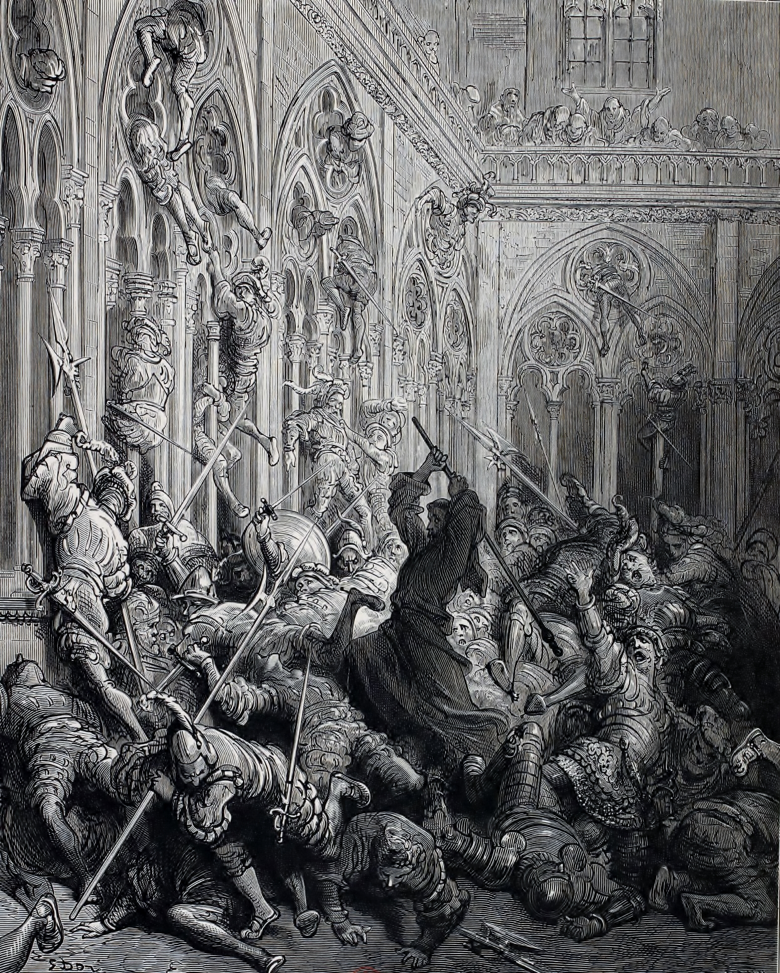 Frère Jean défend le clos de l'abbaye de Seuilly (anciennement Seuillé) contre l'armée picrocholine. Gravure extraite de l'édition de 1873 de Garnier Frères.